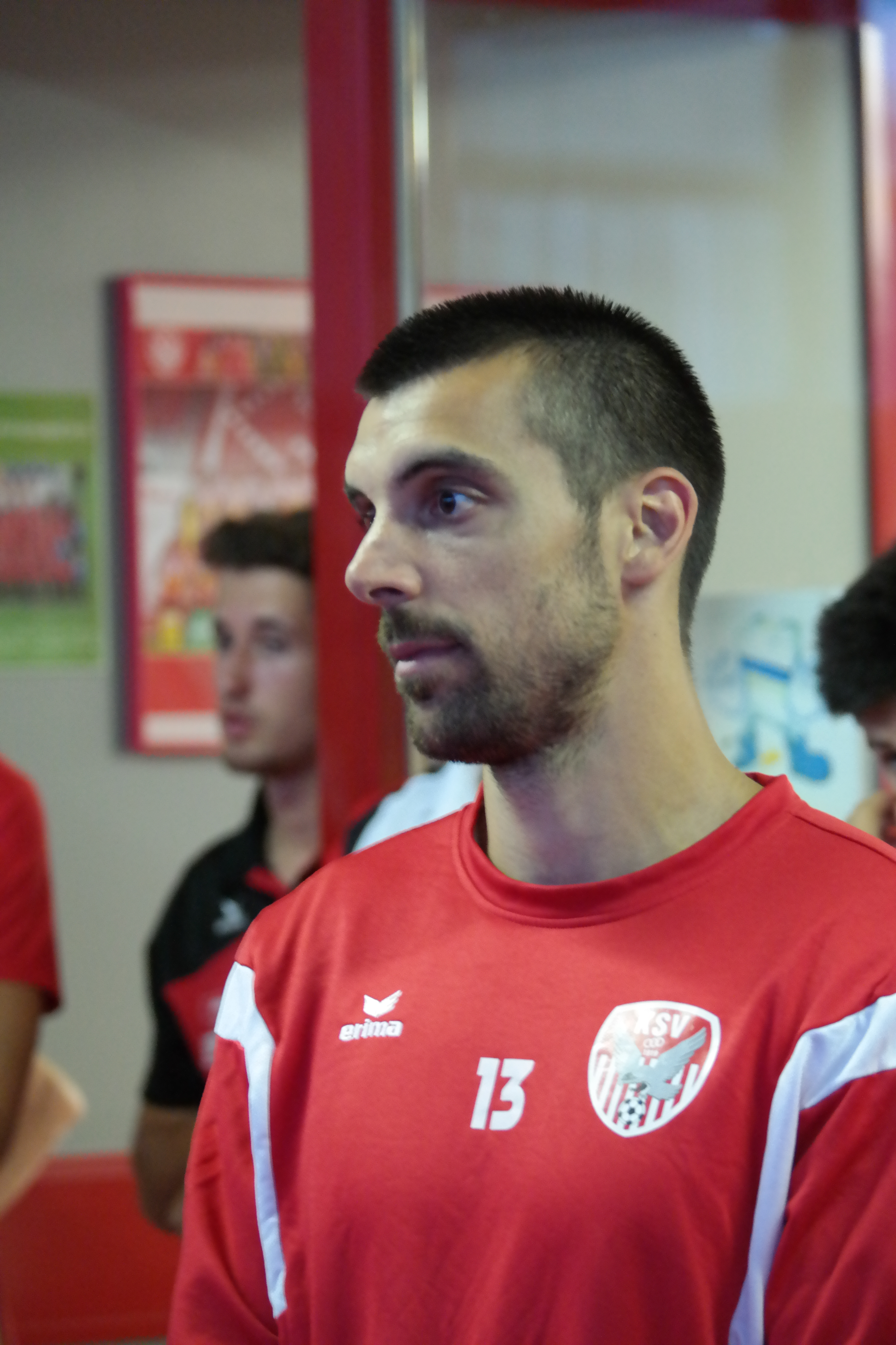 Mannschaftspräsentation der KSV im Juli 2017